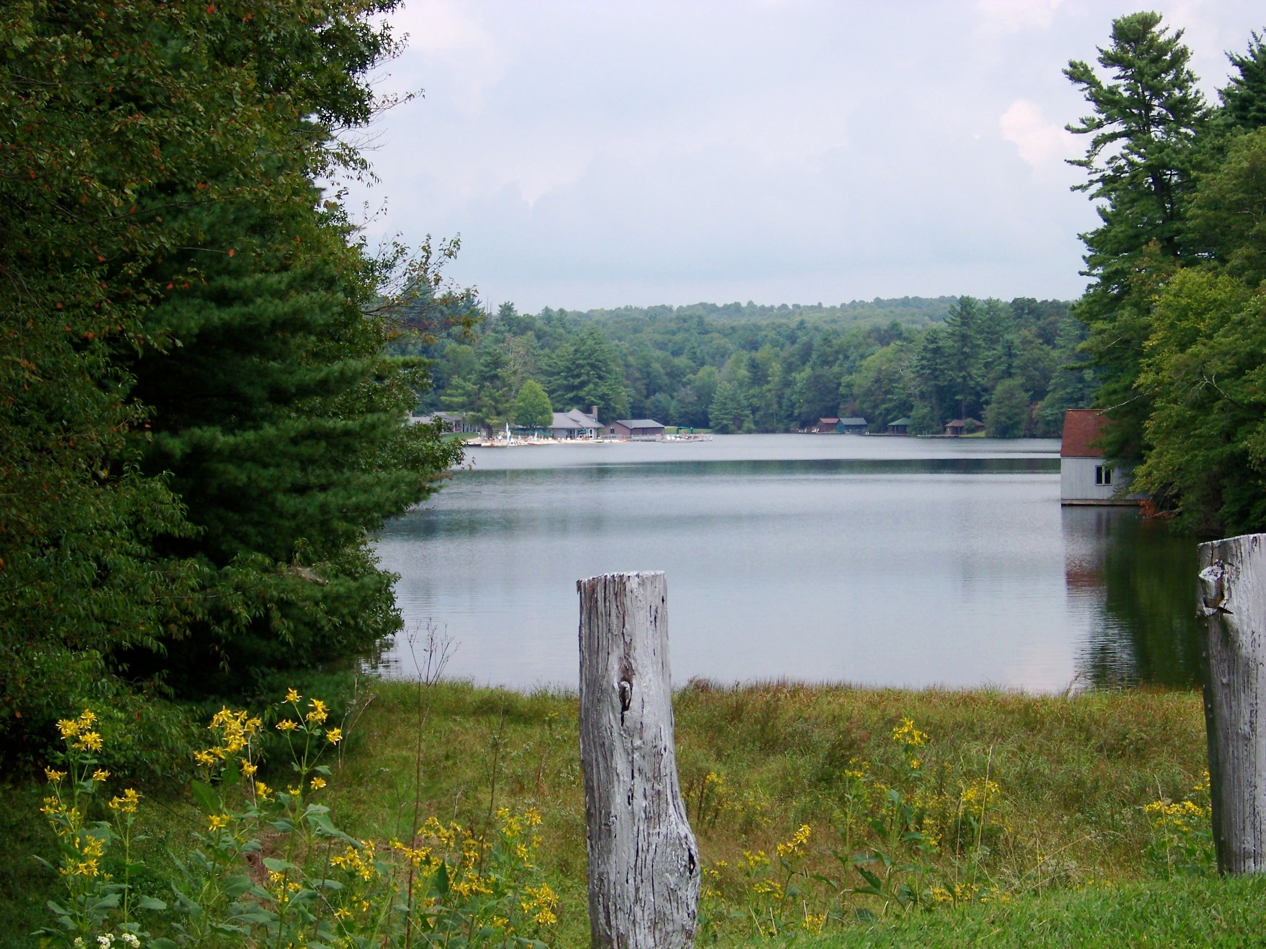 Lake Louise